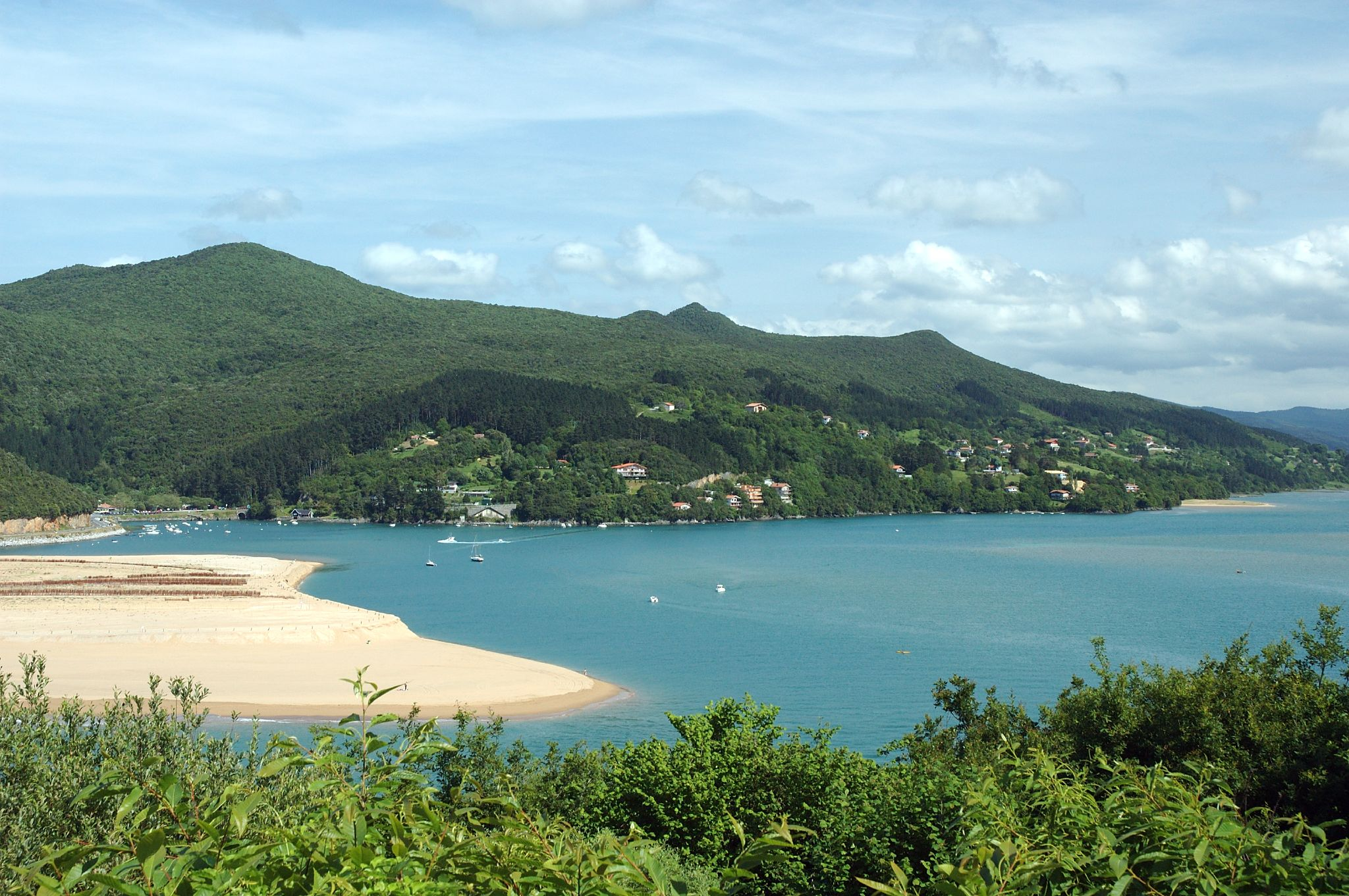 Laidako hondartza eta mundakako itsadarra .Mundaka